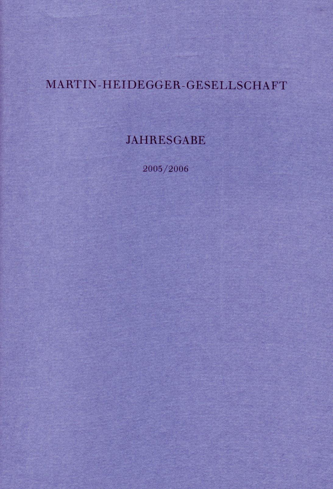 Martin Heidegger - Jahresgabe der Heideggergesellschaft